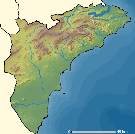 Localización del río Girona respecto de la provincia de Alicante (España).